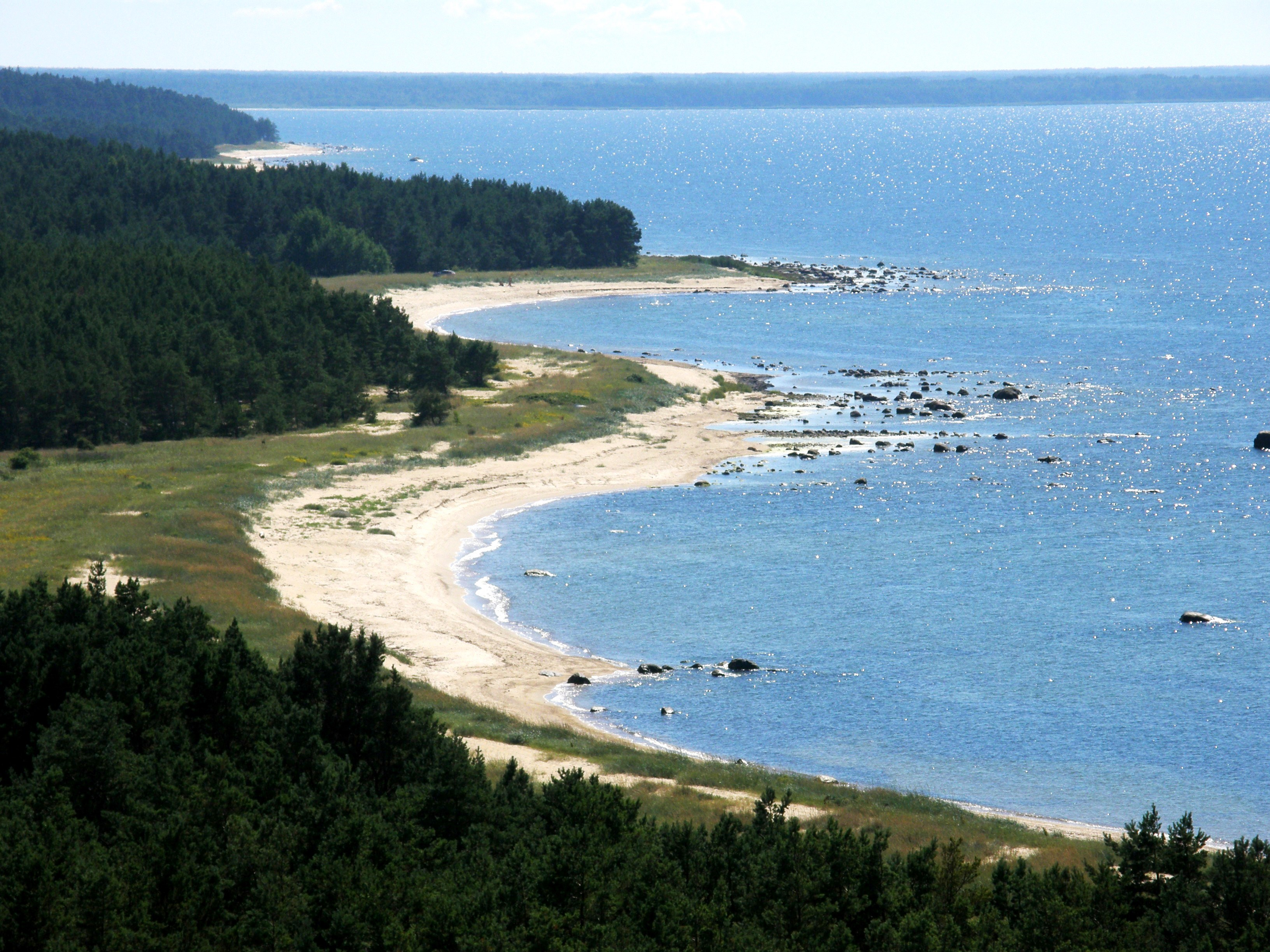 Asukoht: Tahkuna, Hiiumaa